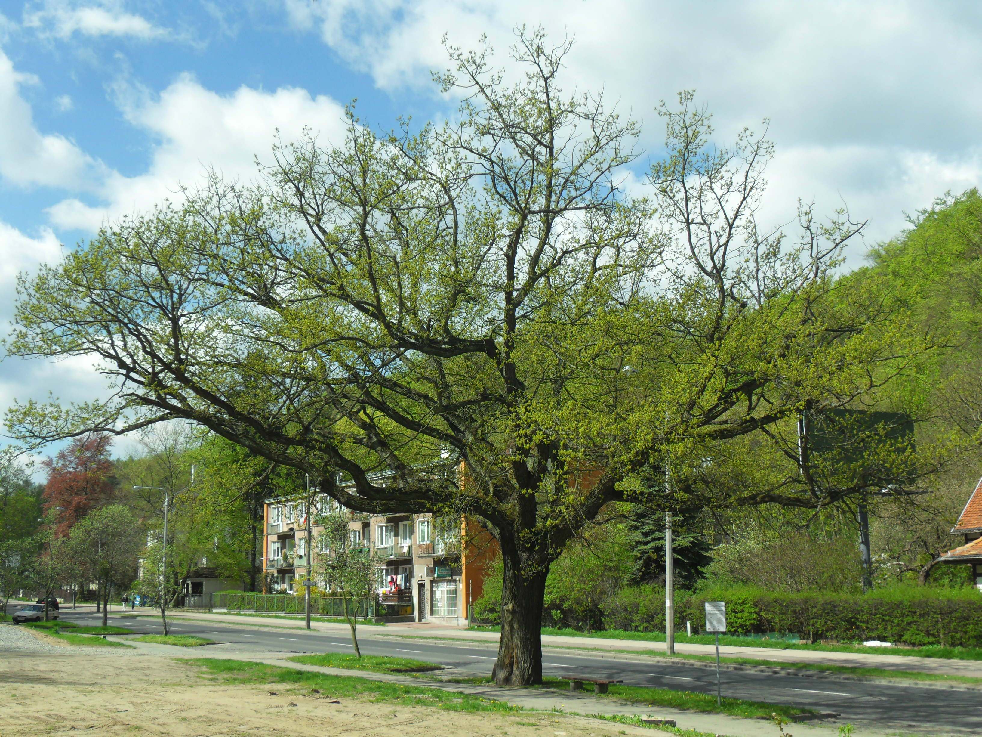 Gdańsk Wrzeszcz Górny, ul. Jaśkowa Dolina 78. Pamiątkowy dąb z 1863 roku przy kamieniu "bitwy narodów".